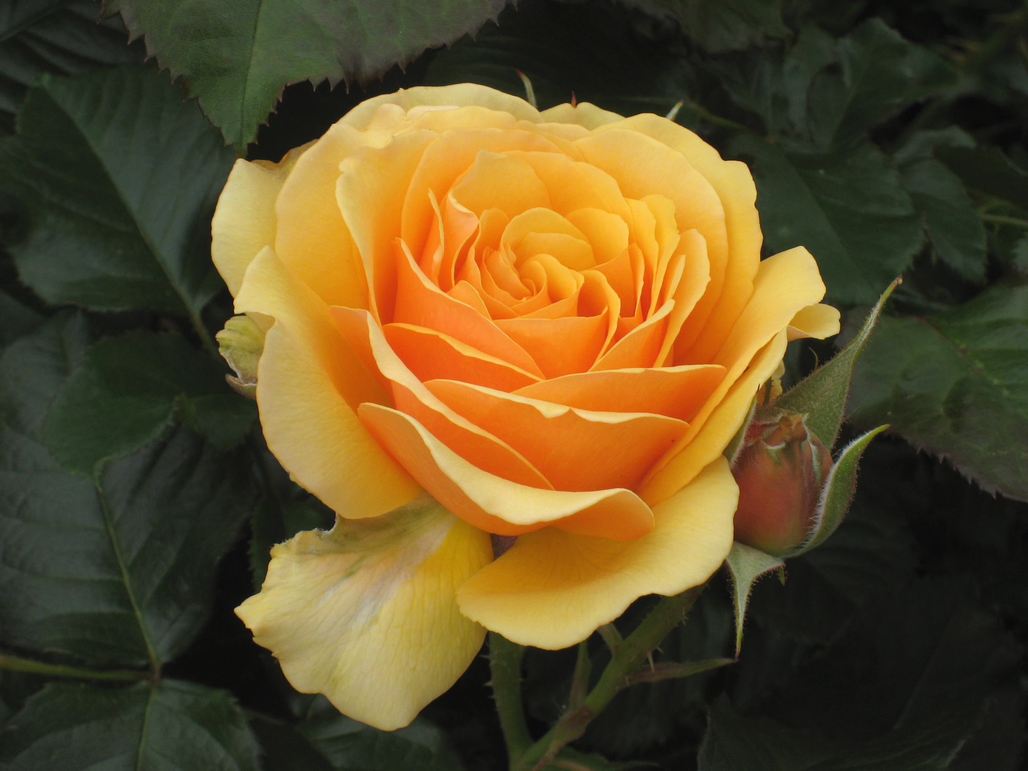 Château de Cheverny, Loir-et-Cher, France - gardens, yellow rose